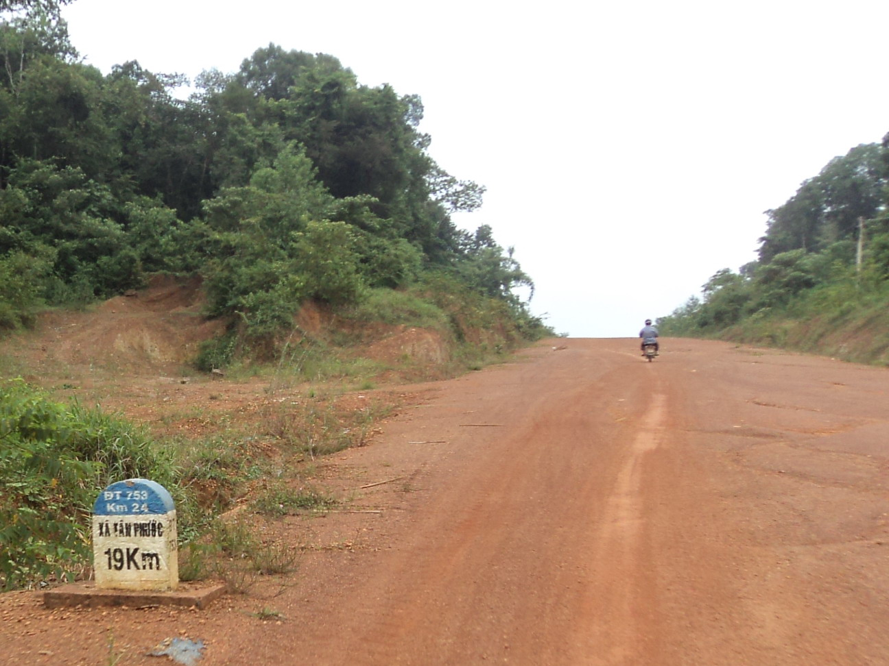 Đồng Phú, Binh Phuoc, Vietnam